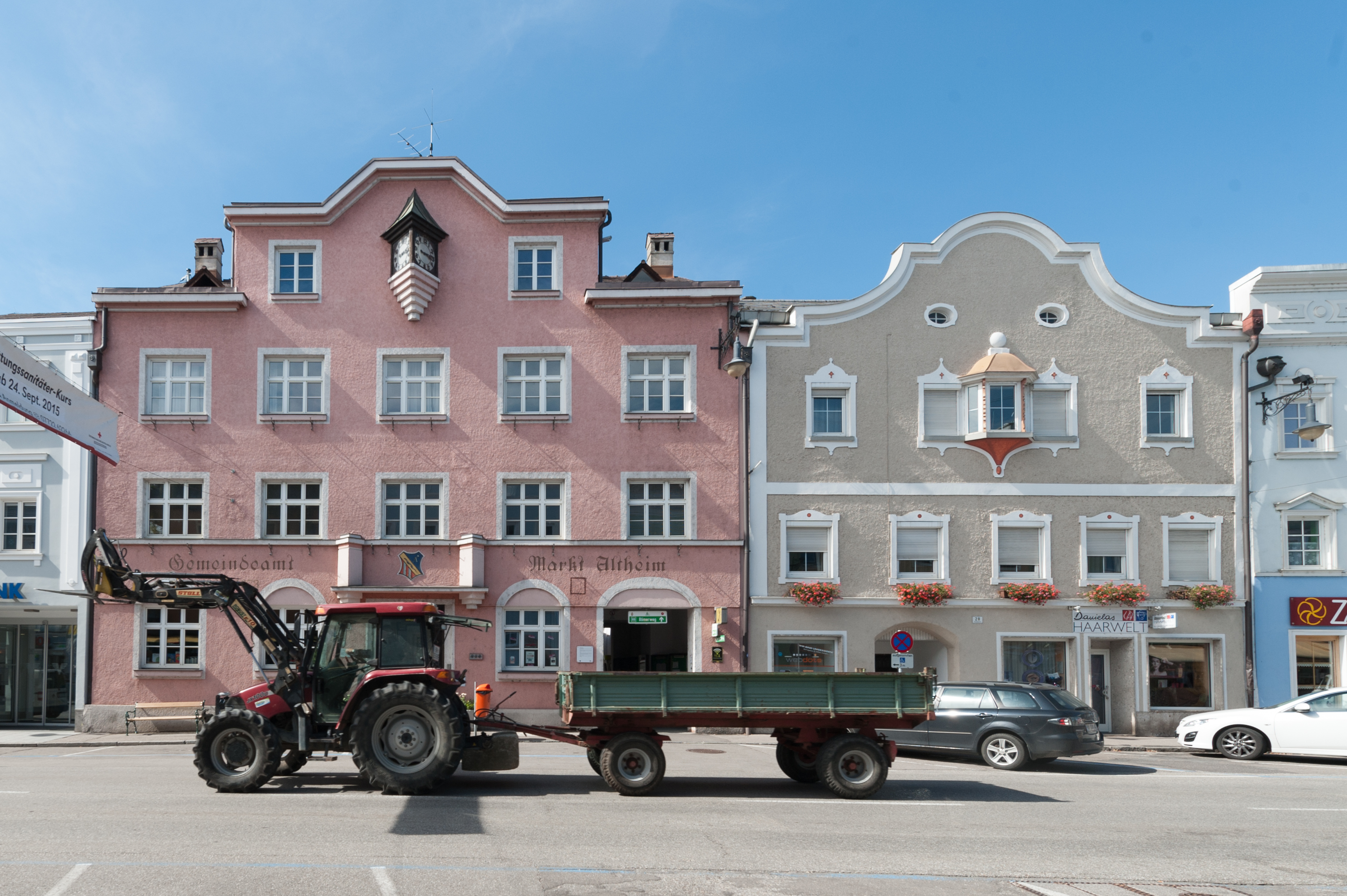 Altheim: Ehemaliges Rathaus